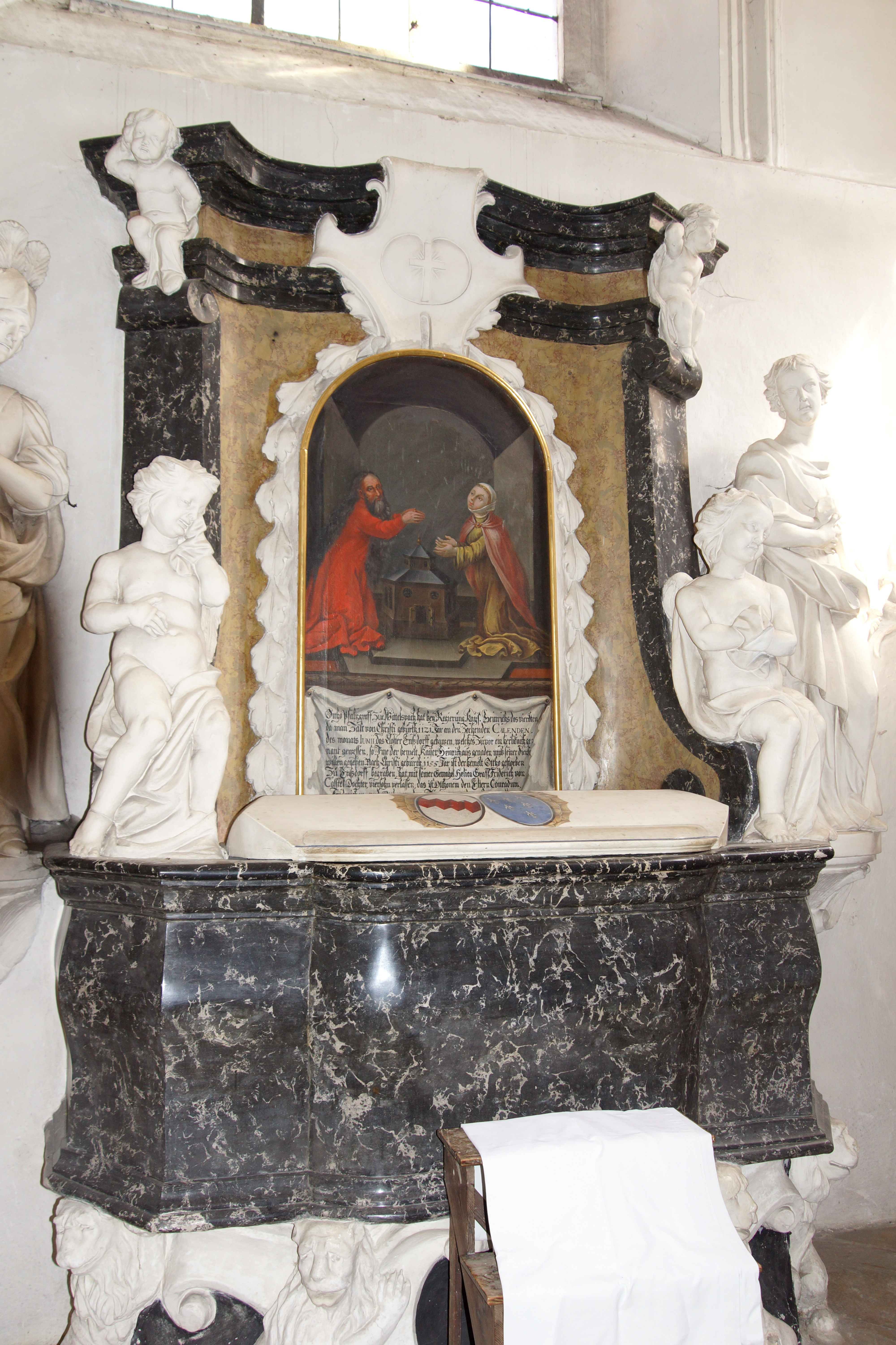 Die Klosterkirche St. Jakob im Oberpfälzischen Ensdorf